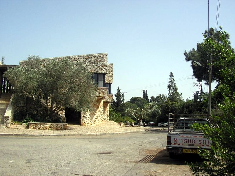 בית הקהילה ביודפת. צולם על ידי